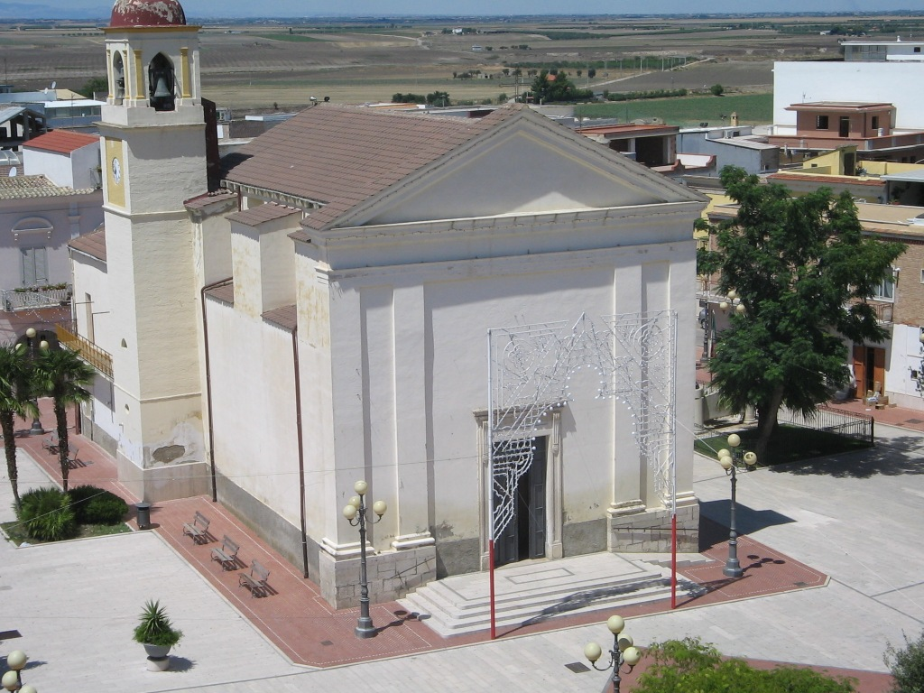 La chiesa di S.Leone vescovo di Ordona - Autore: Renato